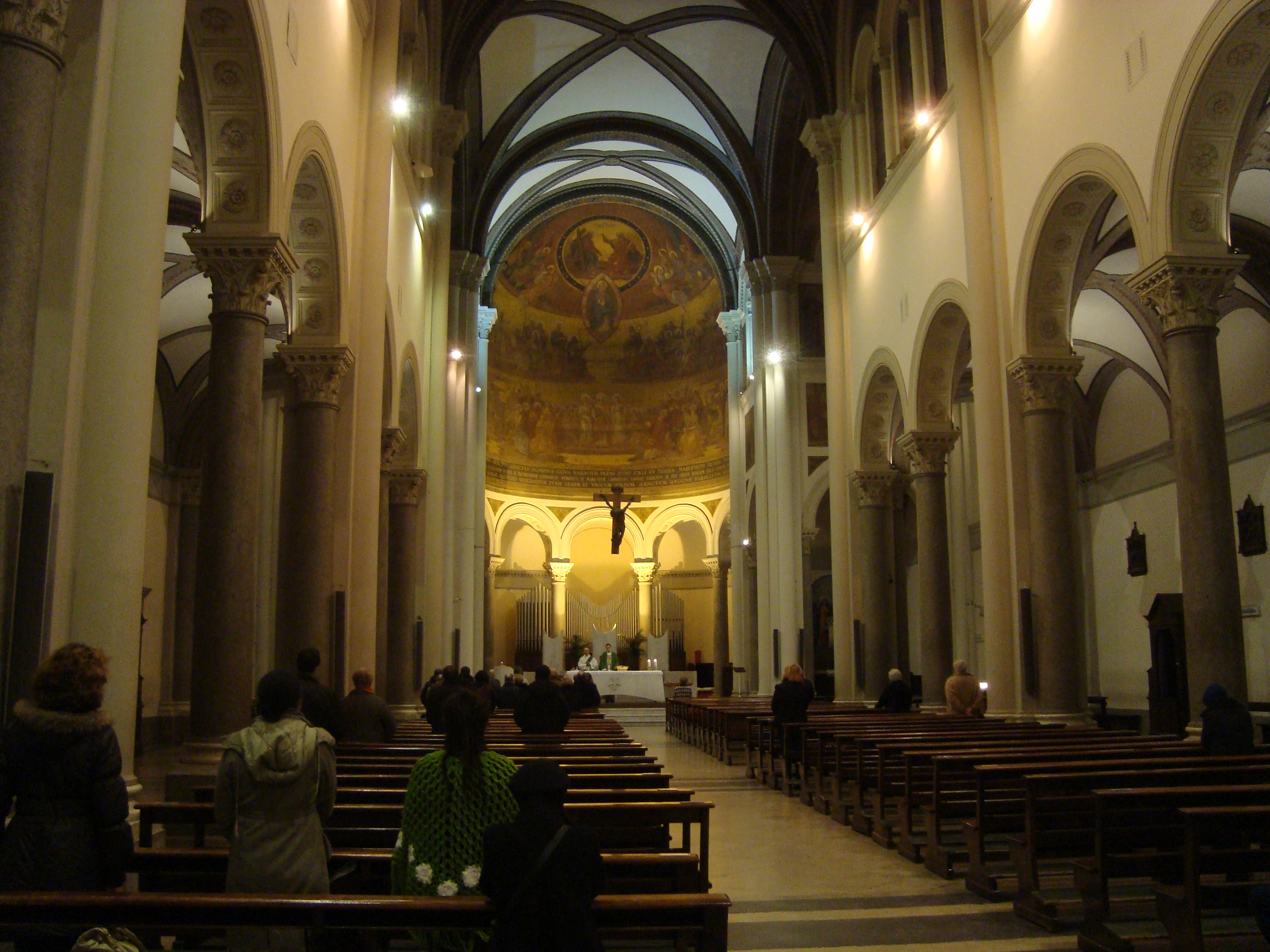 Vue intérieure de l'église durant un office